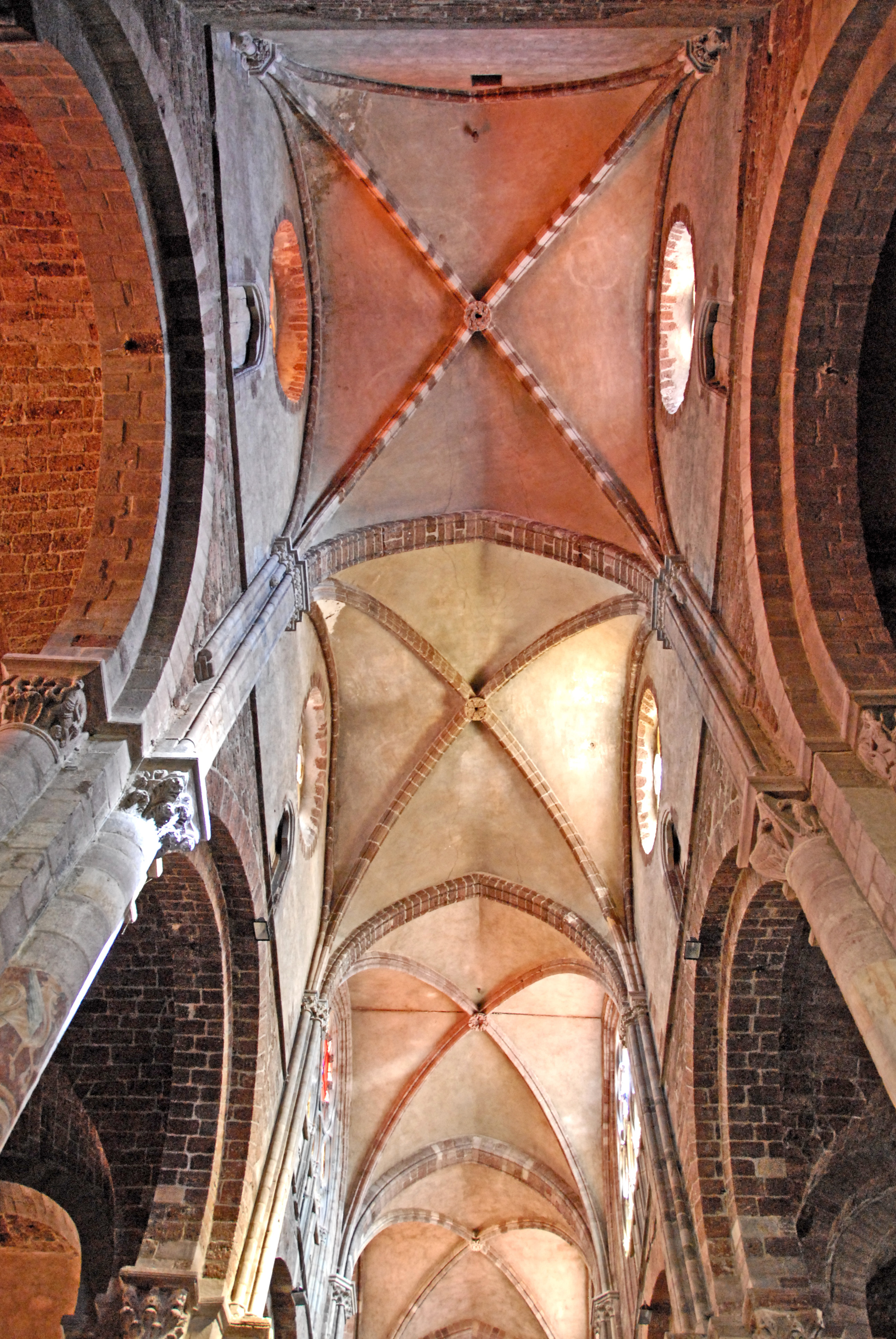 Sain-Julien Brioude, Mittelschiffgewölbe, Joche 1-4